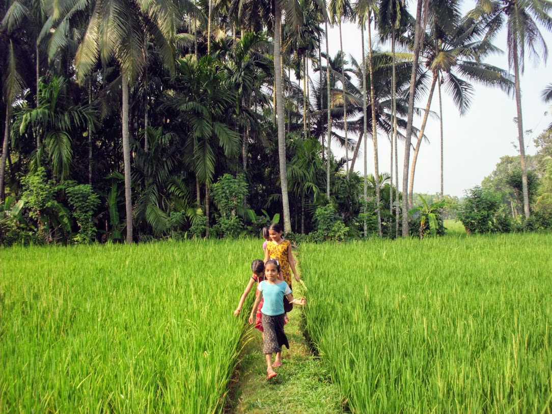 ഒരു പാലക്കാടൻ ഗ്രാമക്കാഴ്ച പാടവരമ്പിലൂടെ കുട്ടികളുടെ ആഘോഷയാത്ര !